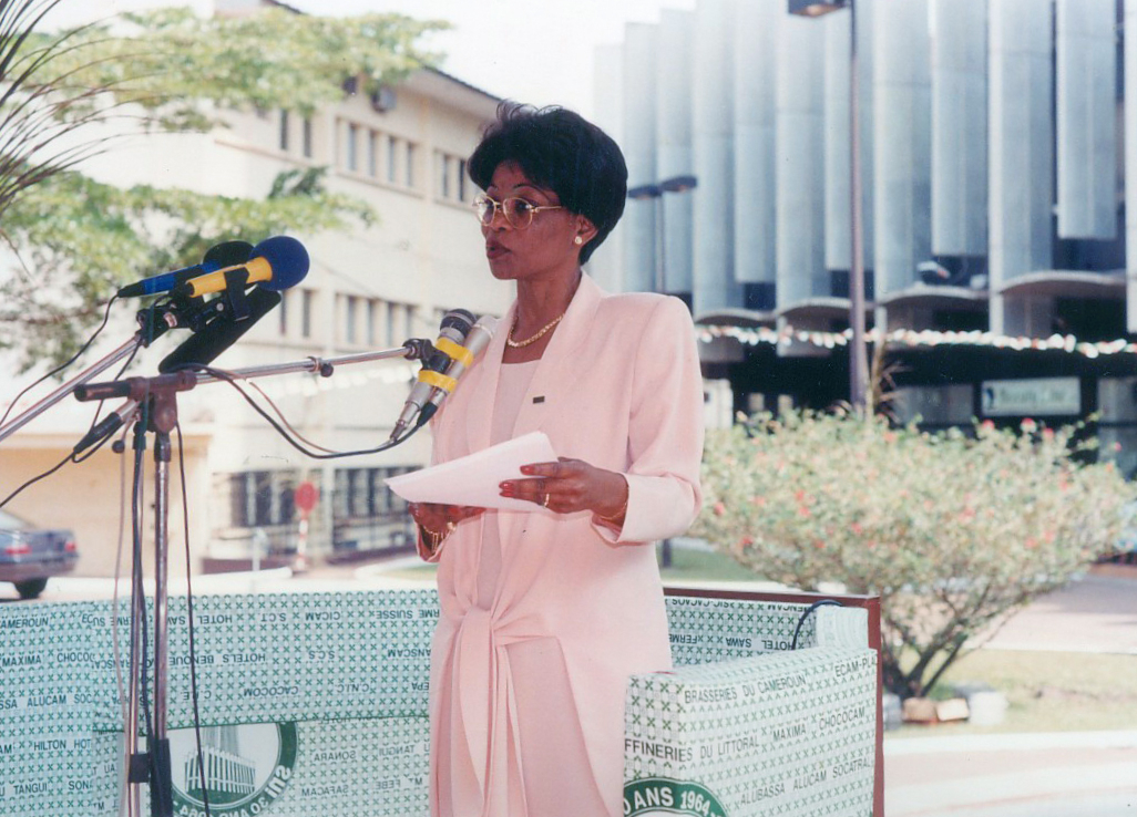 Esther Belibi D., immeuble siège de la SNI